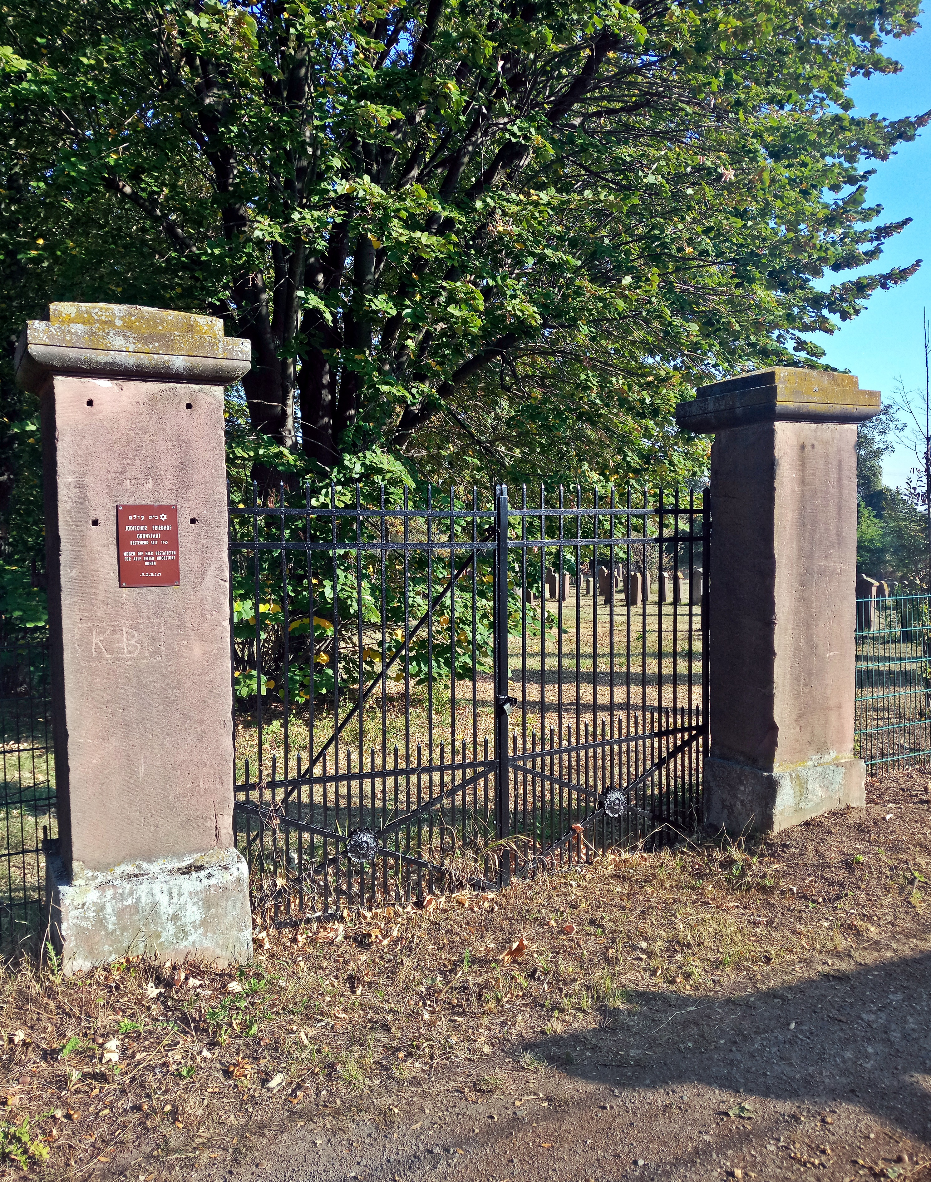 Grünstadt Judenfriedhof Eingang